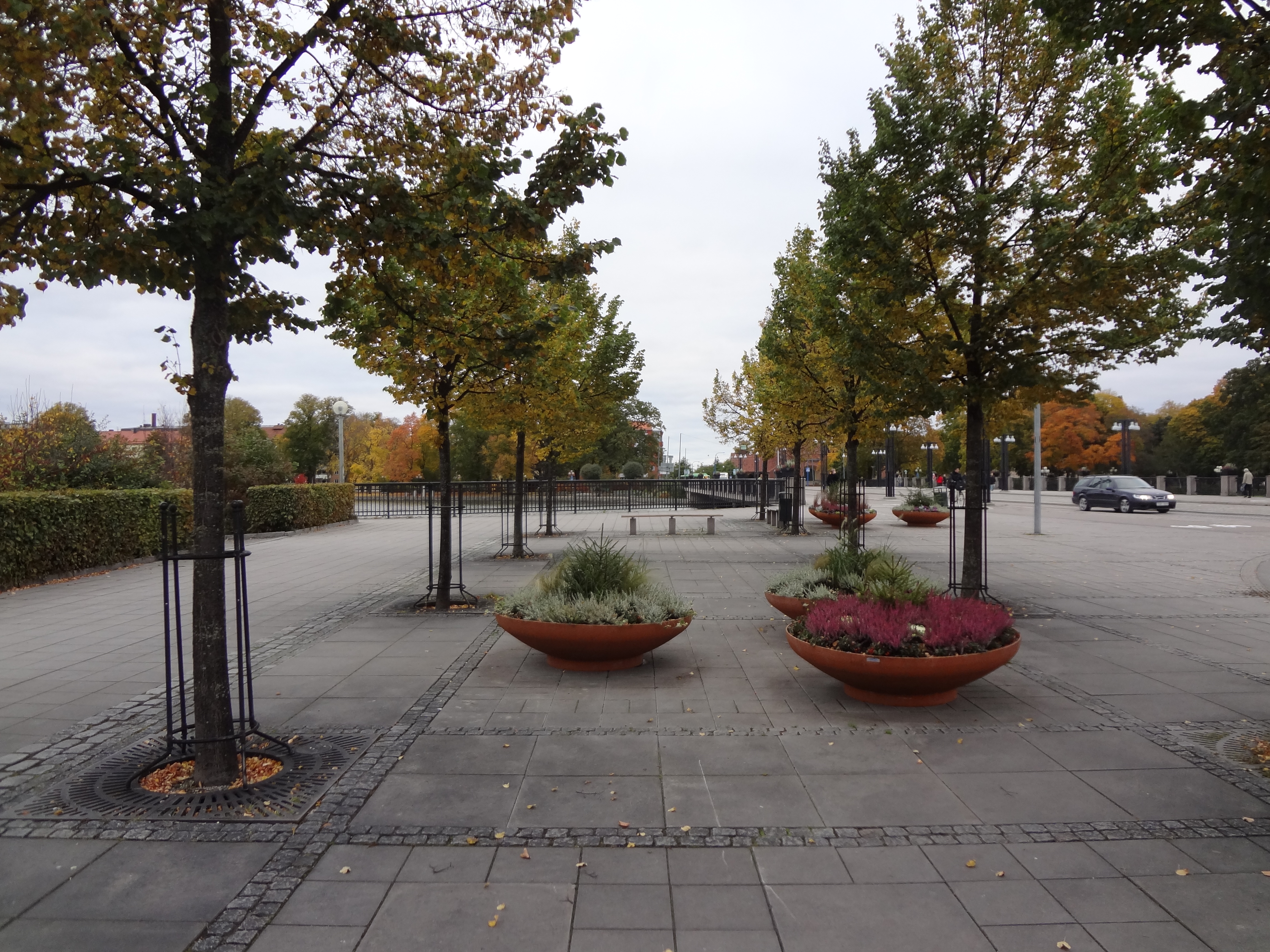 Nybron i Eskilstuna, södra brofästet. (Bilarna till höger kommer från bron.)